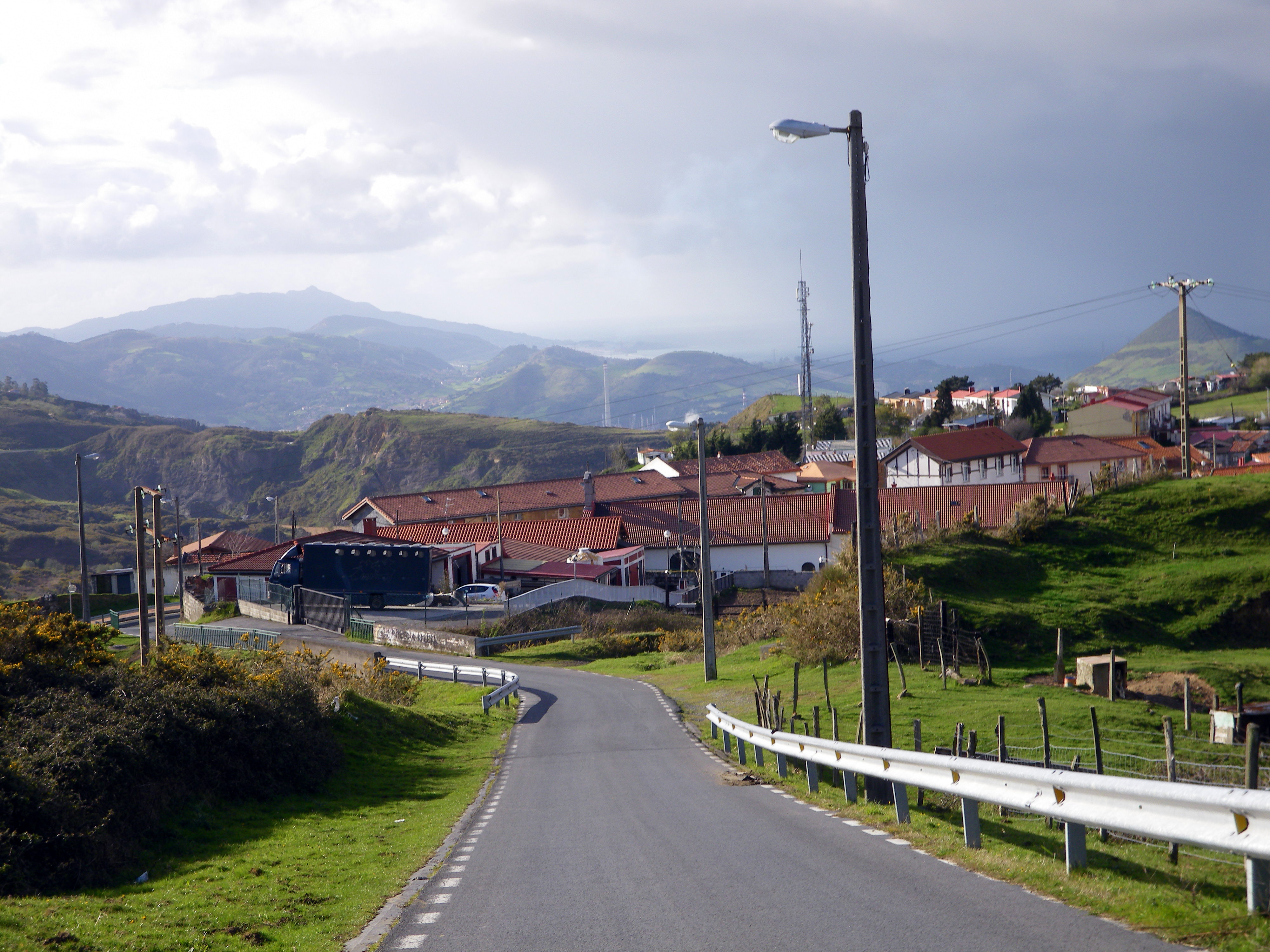 Larreineta auzoa, (Trapagaran)